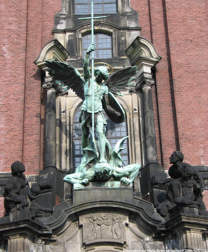 Erzengel Michael über dem Portal des Hamburger Michel. Statue von August Vogel. Auf dem Foto ist der Bereich über dem Portal zum Michel zu sehen. Direkt über dem Portal befindet sich ein Relief, das den Sündenfall darstellt. Ein detaillierteres Foto dieses Reliefs findet sich hier. This is a photograph of an architectural monument.